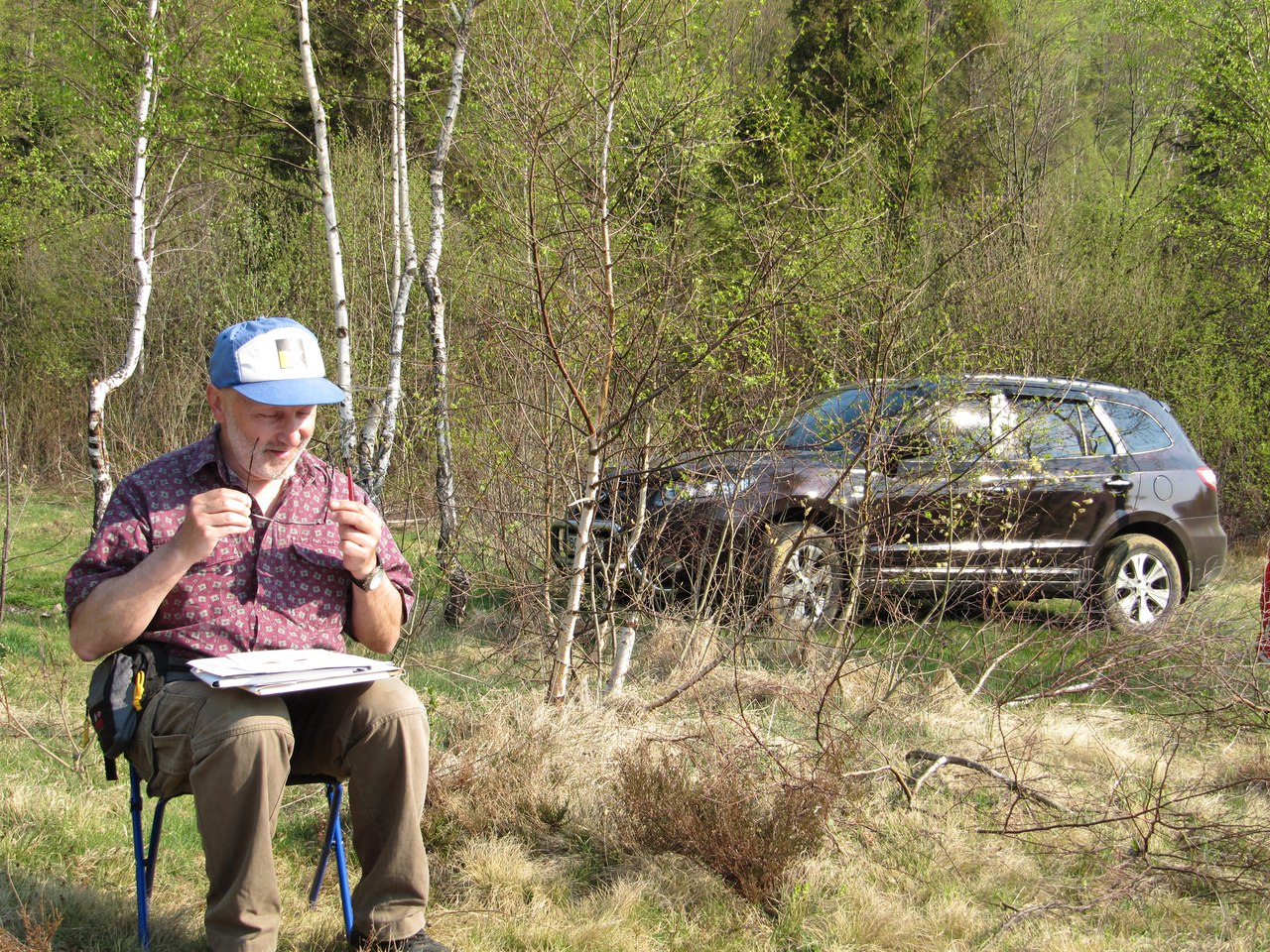 Юрій Олексійович Дьячек